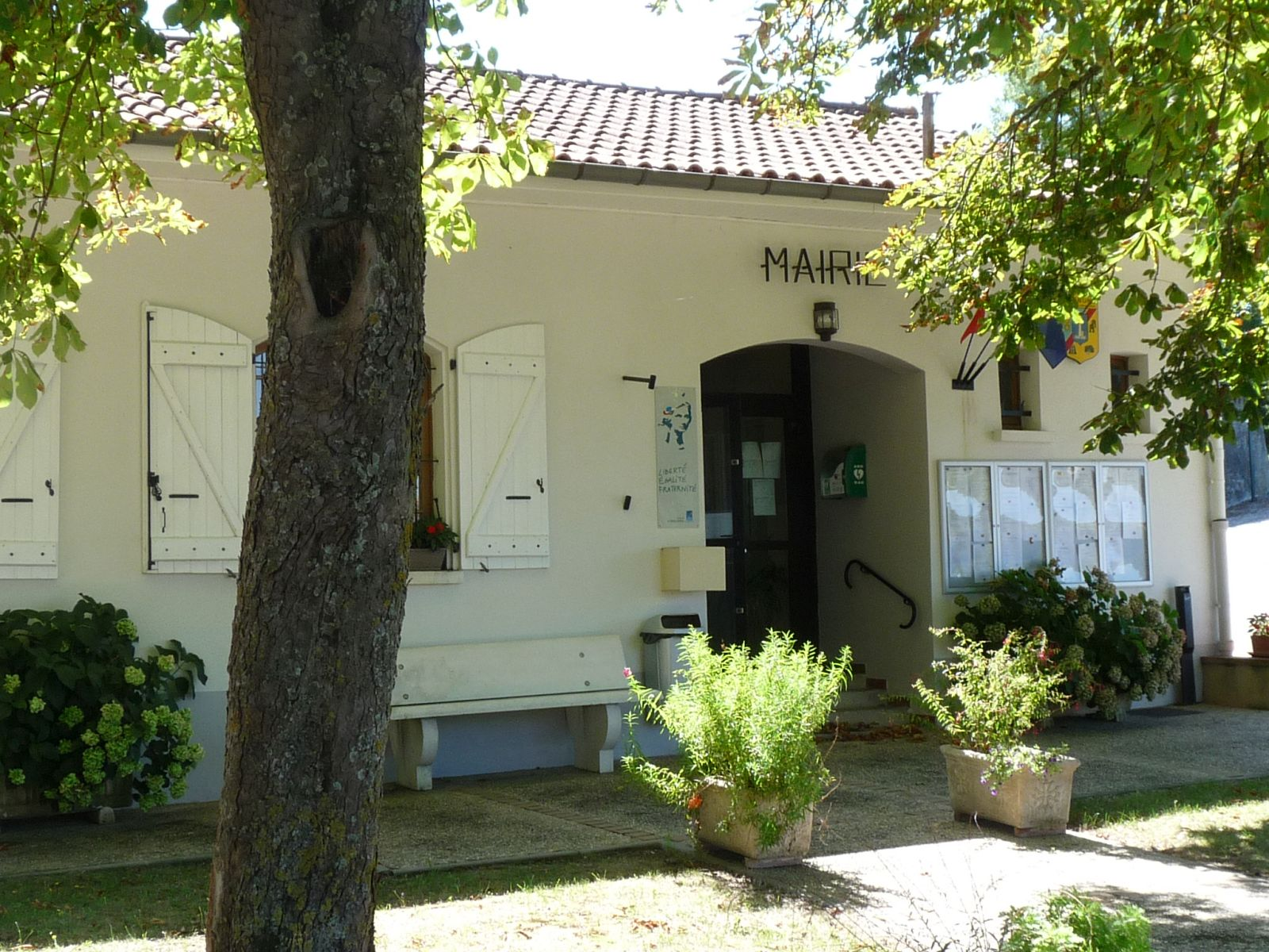 Mairie de Trébons-sur-la-Grasse, Haute-Garonne, France